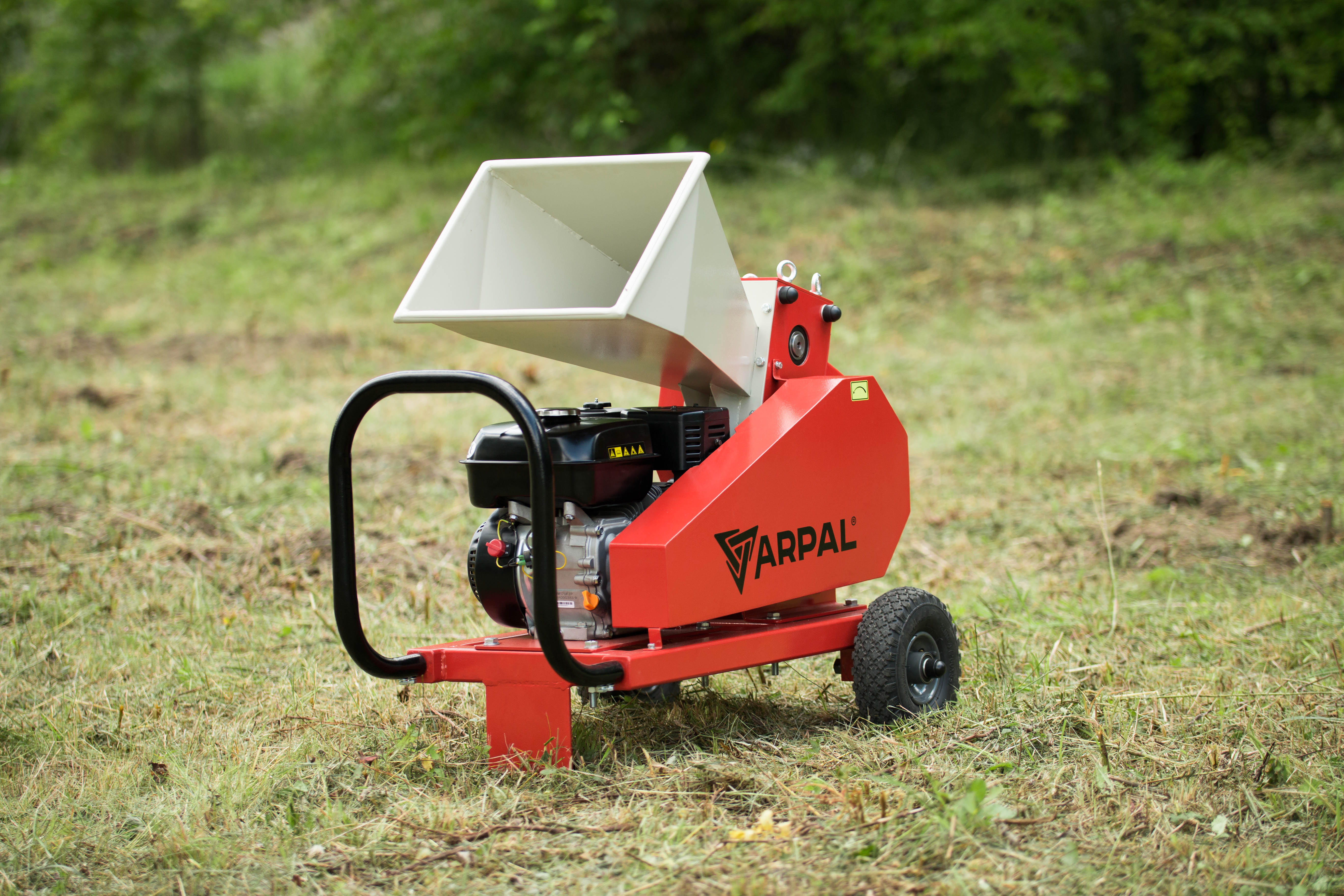 Садовый измельчитель веток АРПАЛ